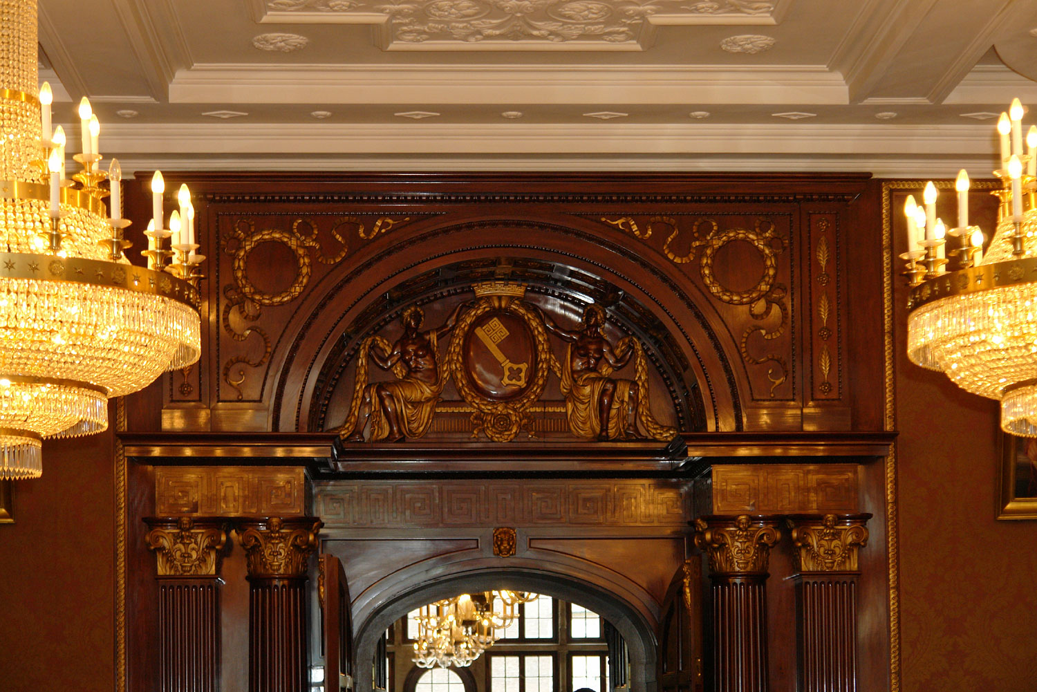 Rathaus in Bremen. Lünette im Senatssaal.